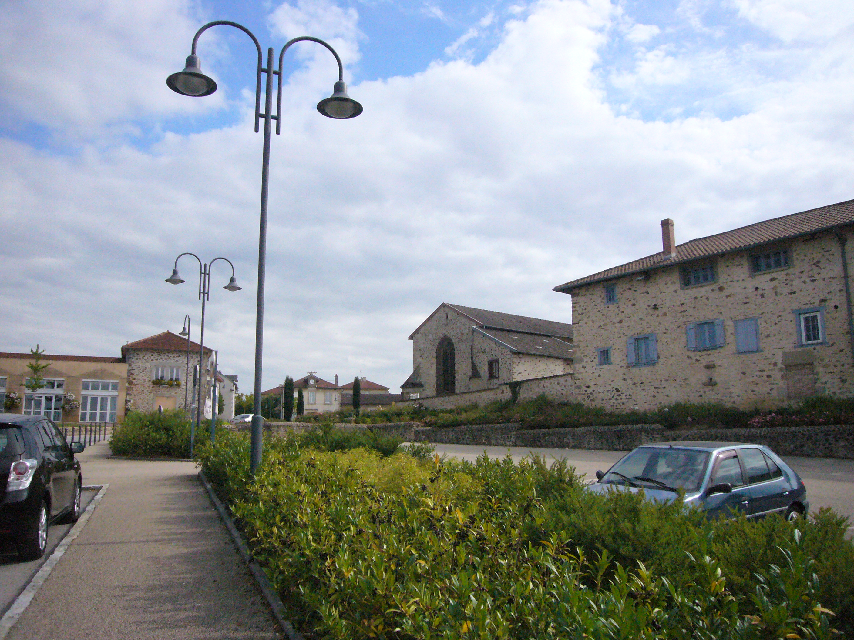 Vue partielle du vieux-bourg de Panazol (Haute-Vienne). De gauche à droite, la salle des fêtes, l'ancien hôtel de police, l'église et le presbytère.